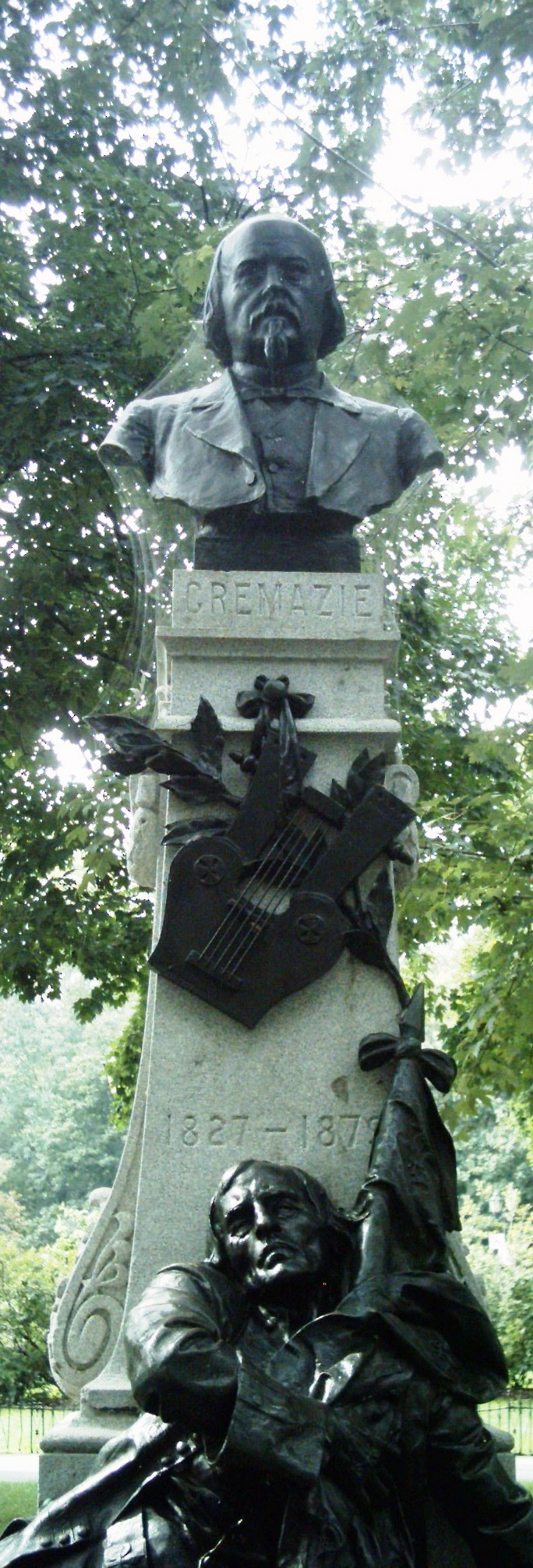 Monument à Crémazie situé au carré St-Louis à Montréal